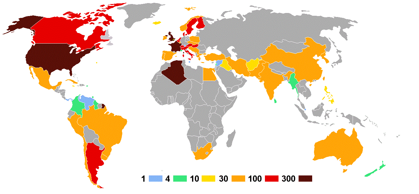 Olympische Sommerspiele 1948 — Anzahl der Athleten